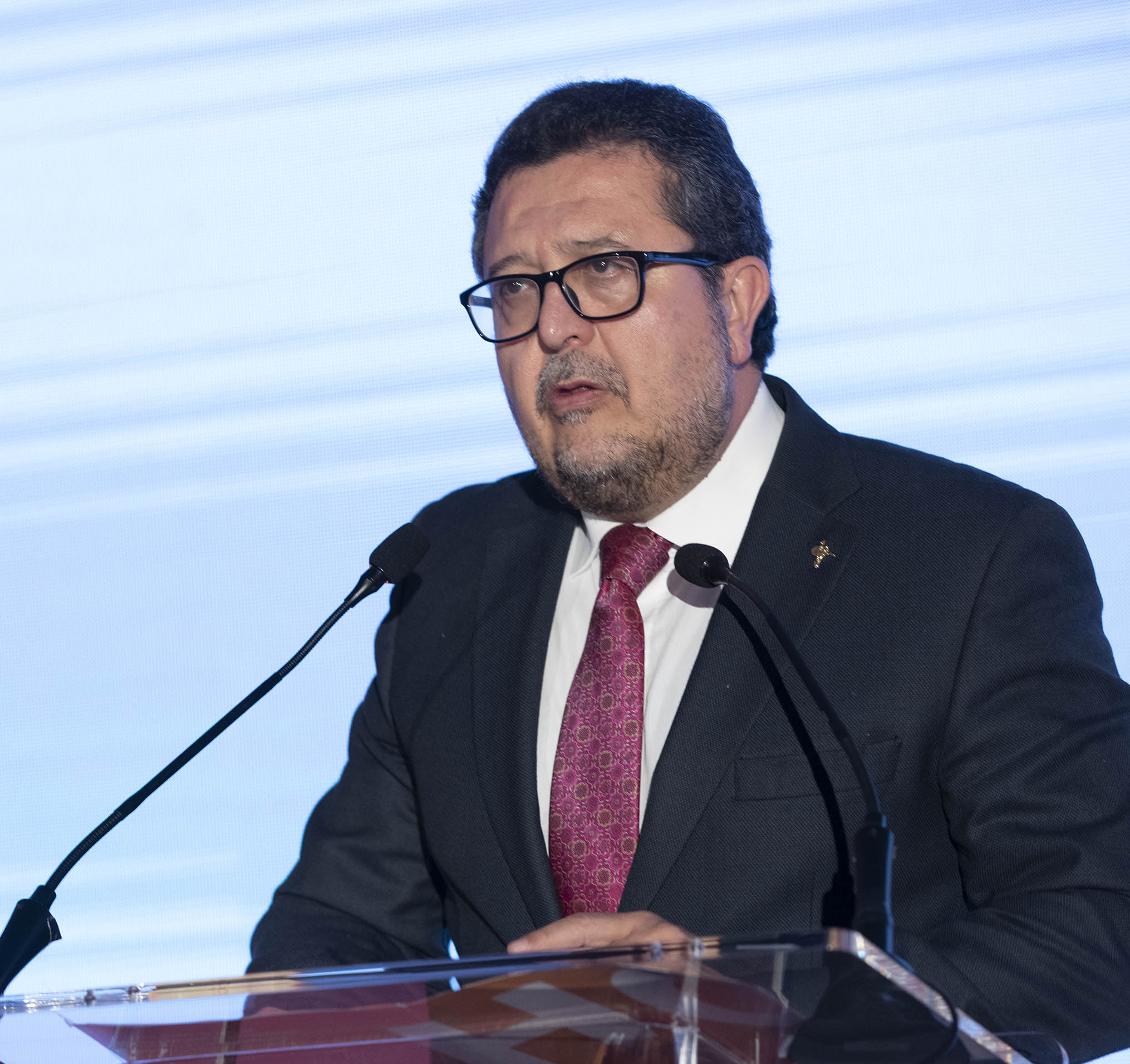 Francisco Serrano Castro en los premios HazteOir de 2019